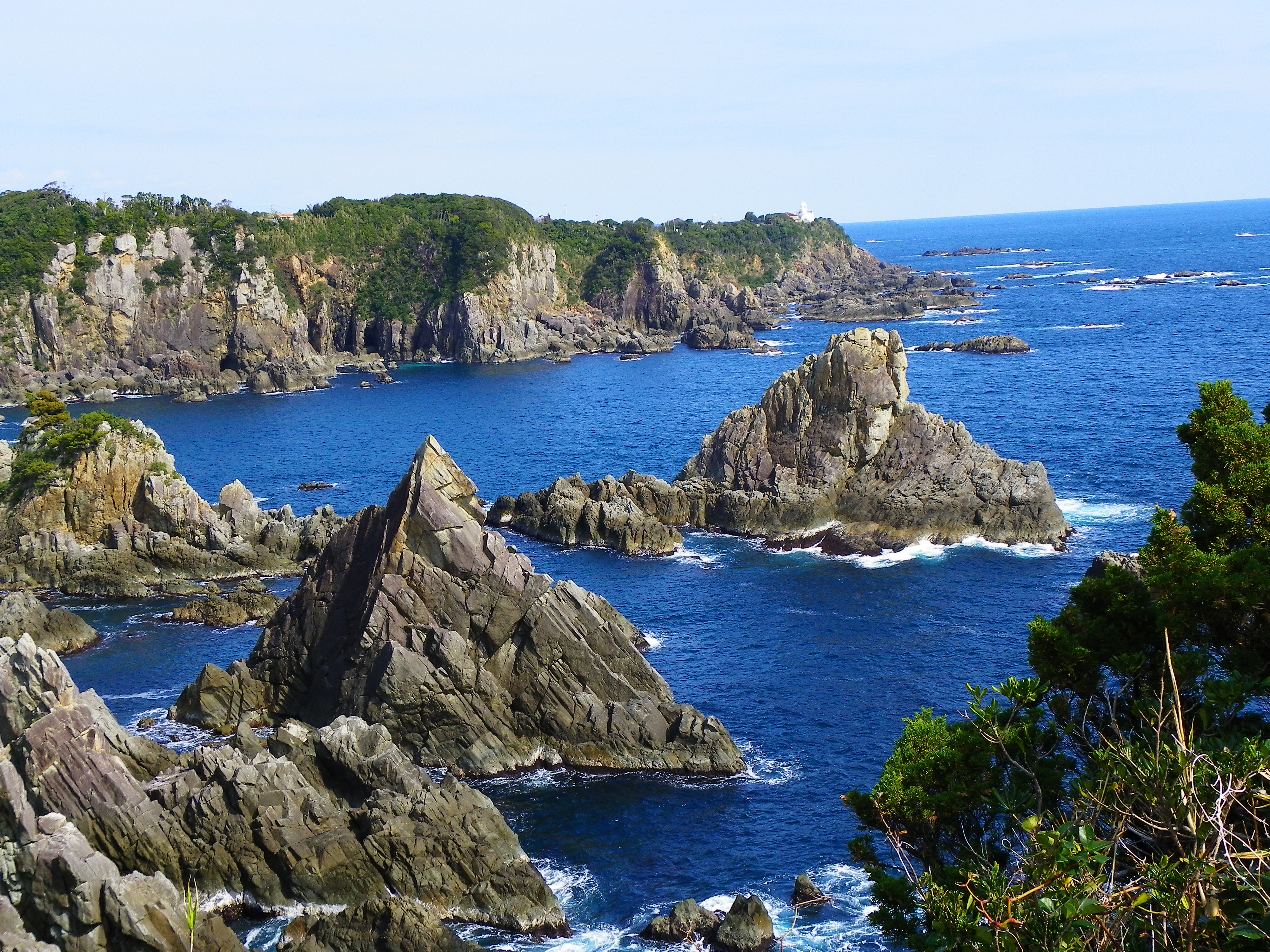 和歌山県東牟婁郡串本町紀伊大島の海金剛。